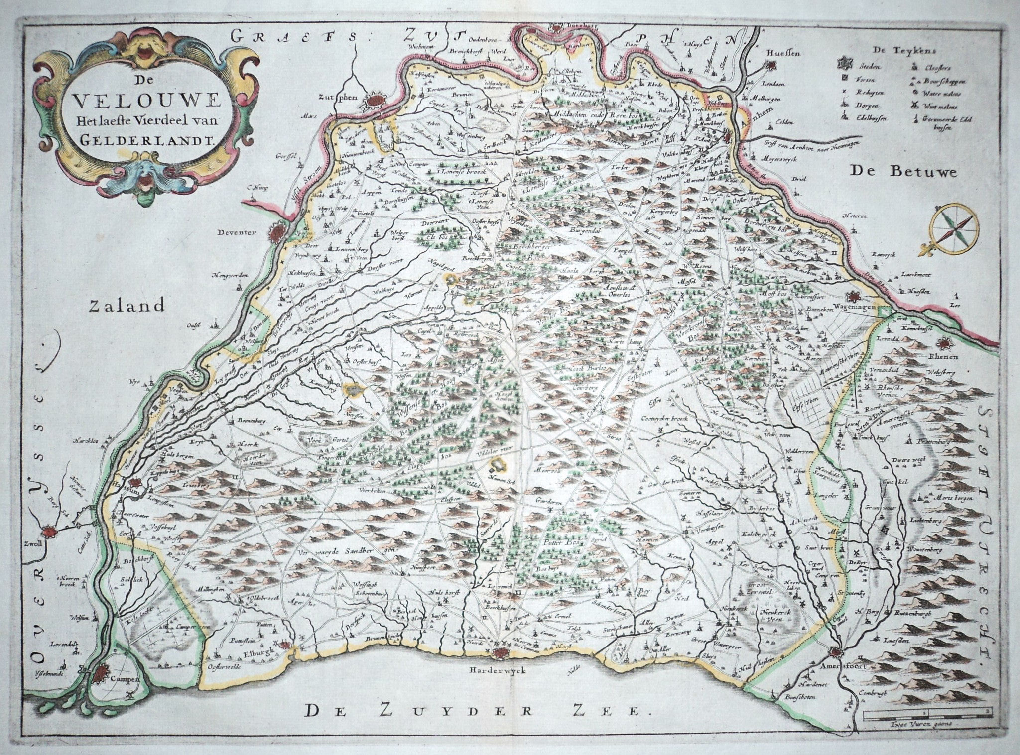 Veluwe Nicolaas Geelkercken 1654